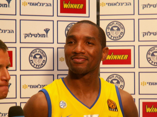 דרק שארפ צולם על-ידי אבי קדמי This picture was taken by Avi Kedmi